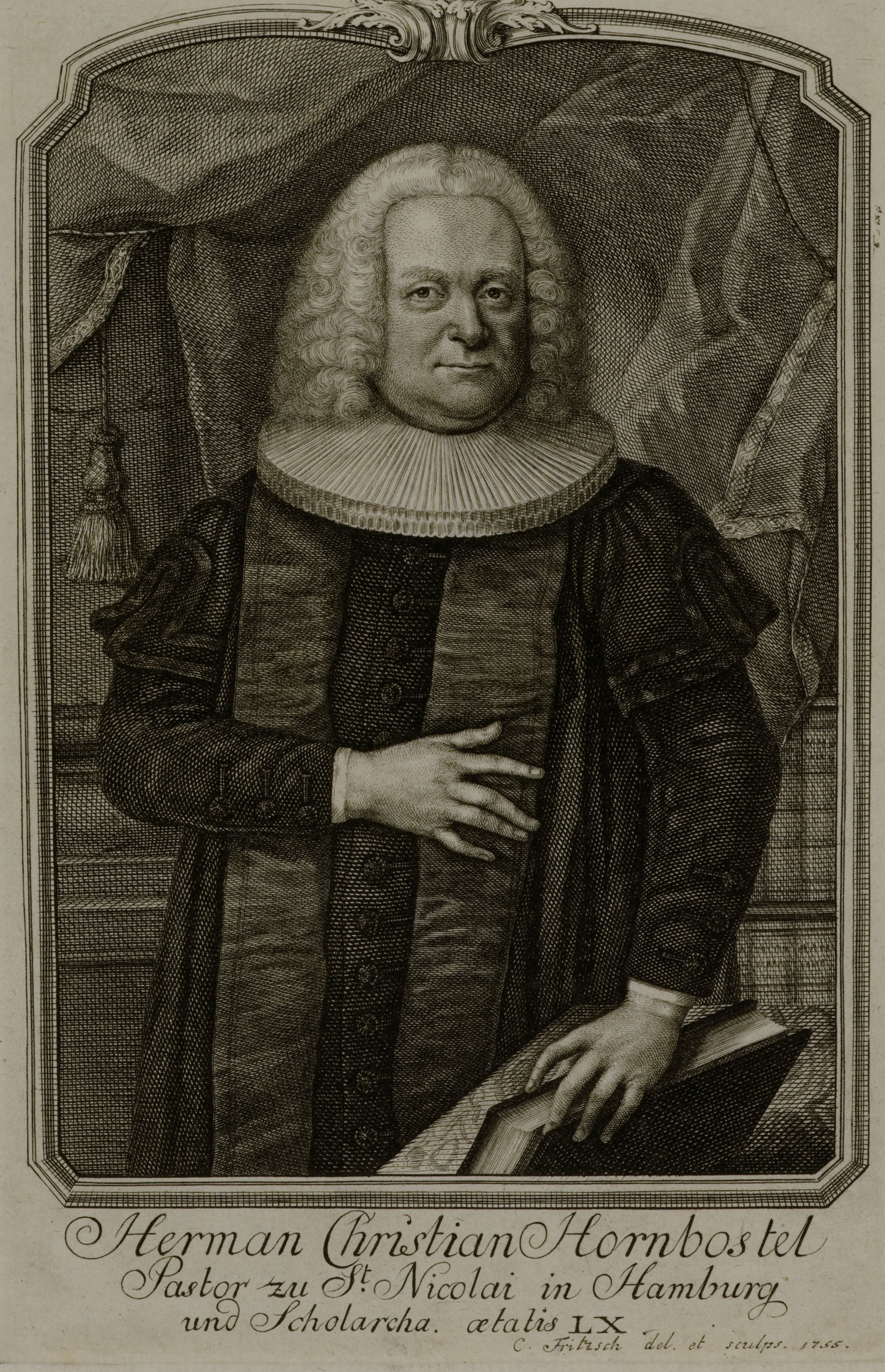 Herman Christian Hornbostel